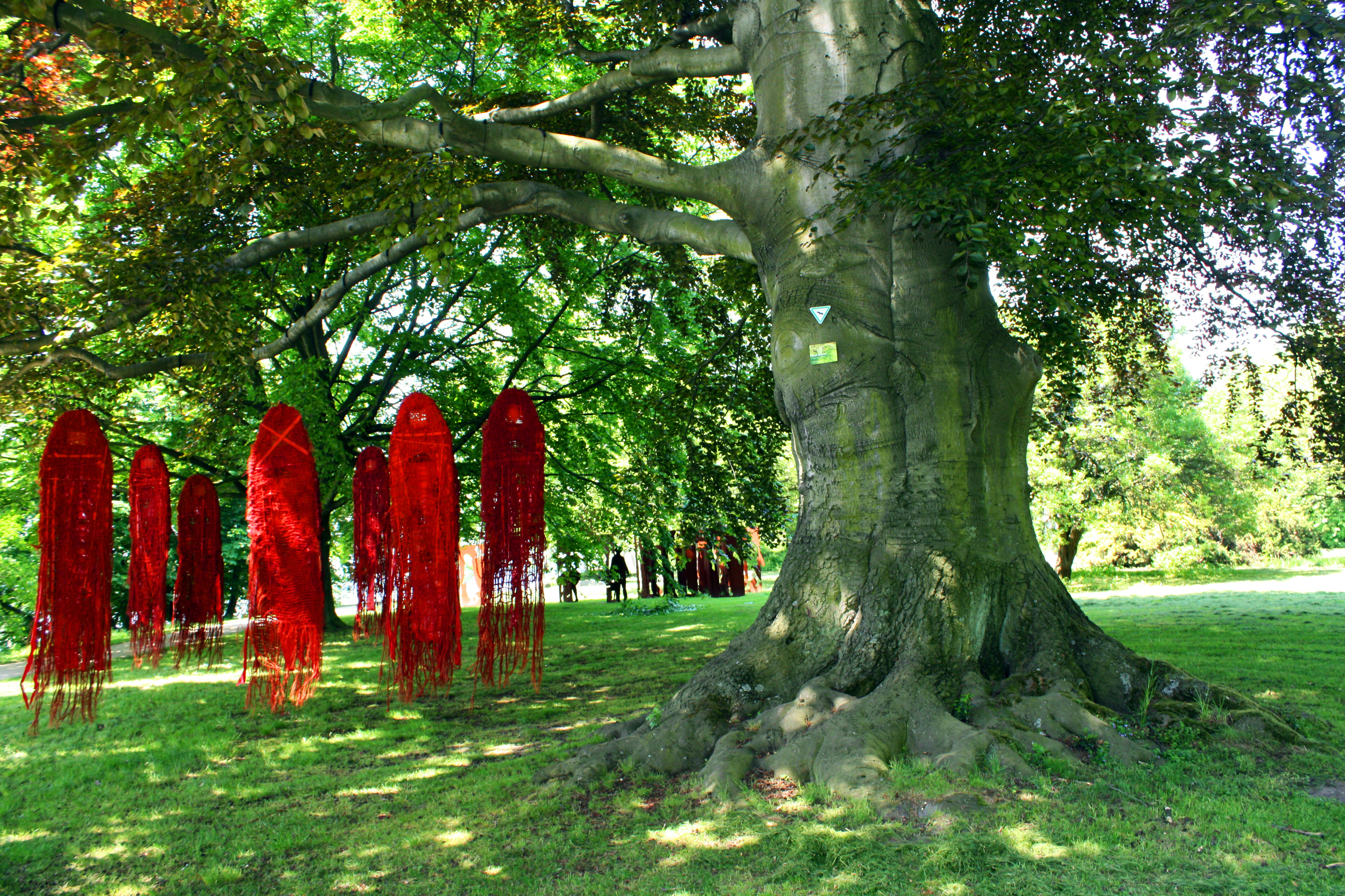 Schlosspark Köln-Stammheim, Natur und Kunst